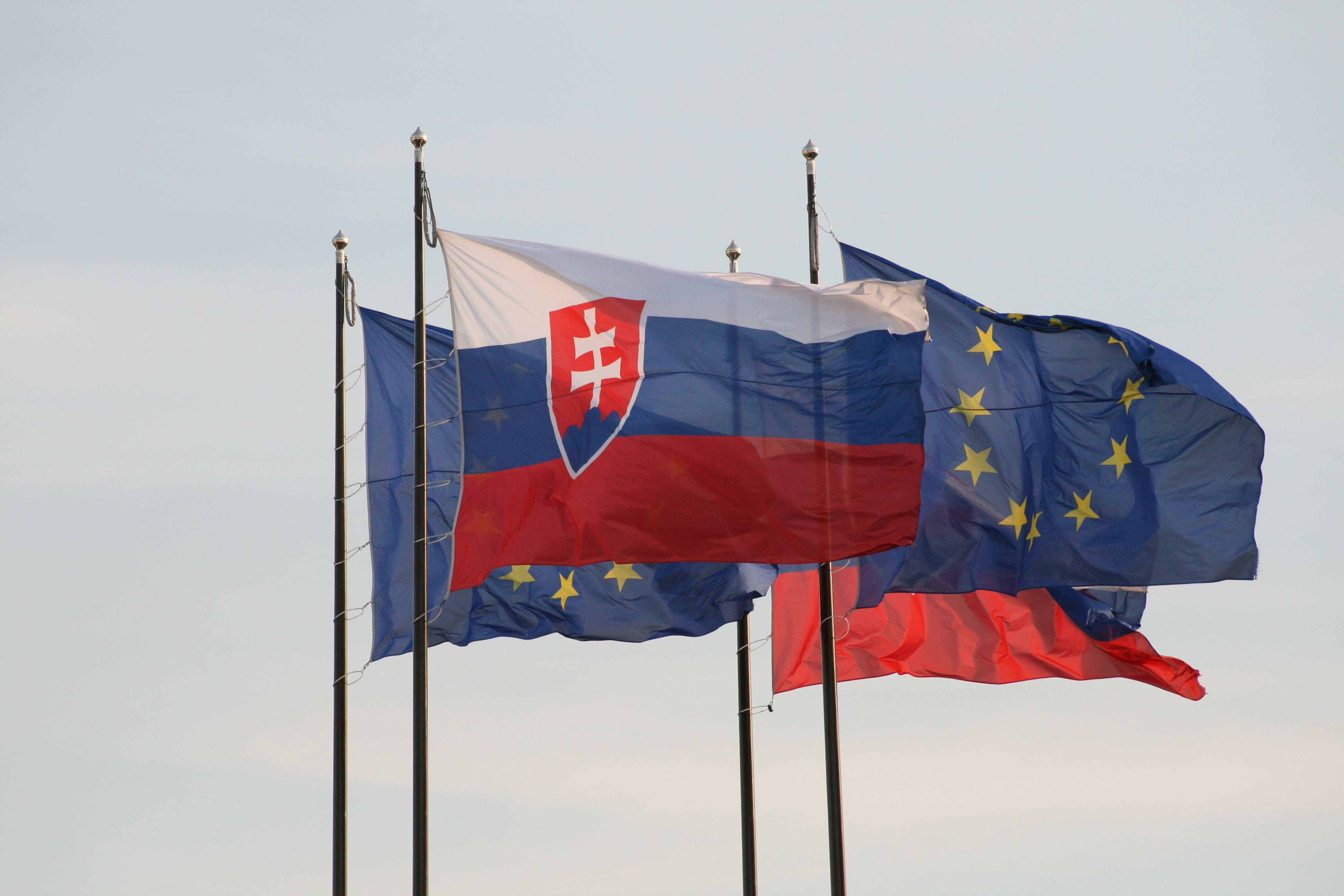 Vlajky Slovenskej republiky s vlajkami EU